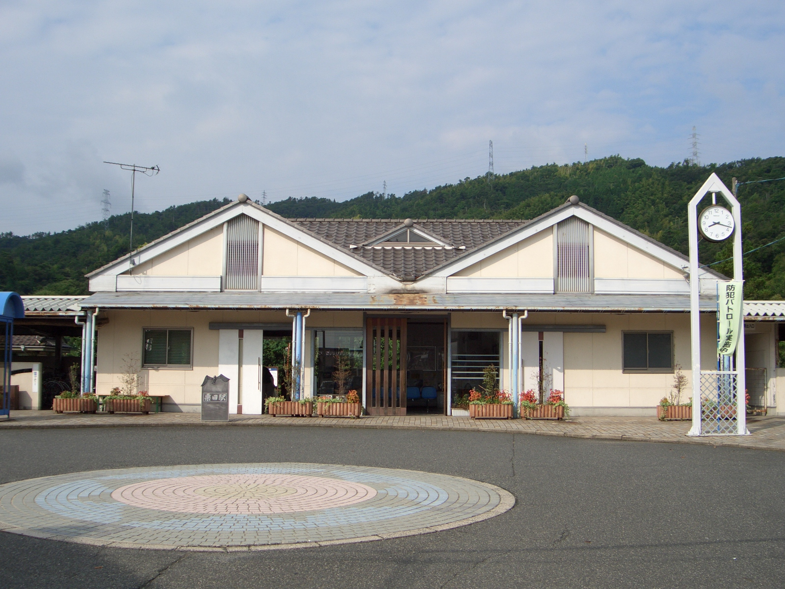 北近畿タンゴ鉄道宮津線栗田駅